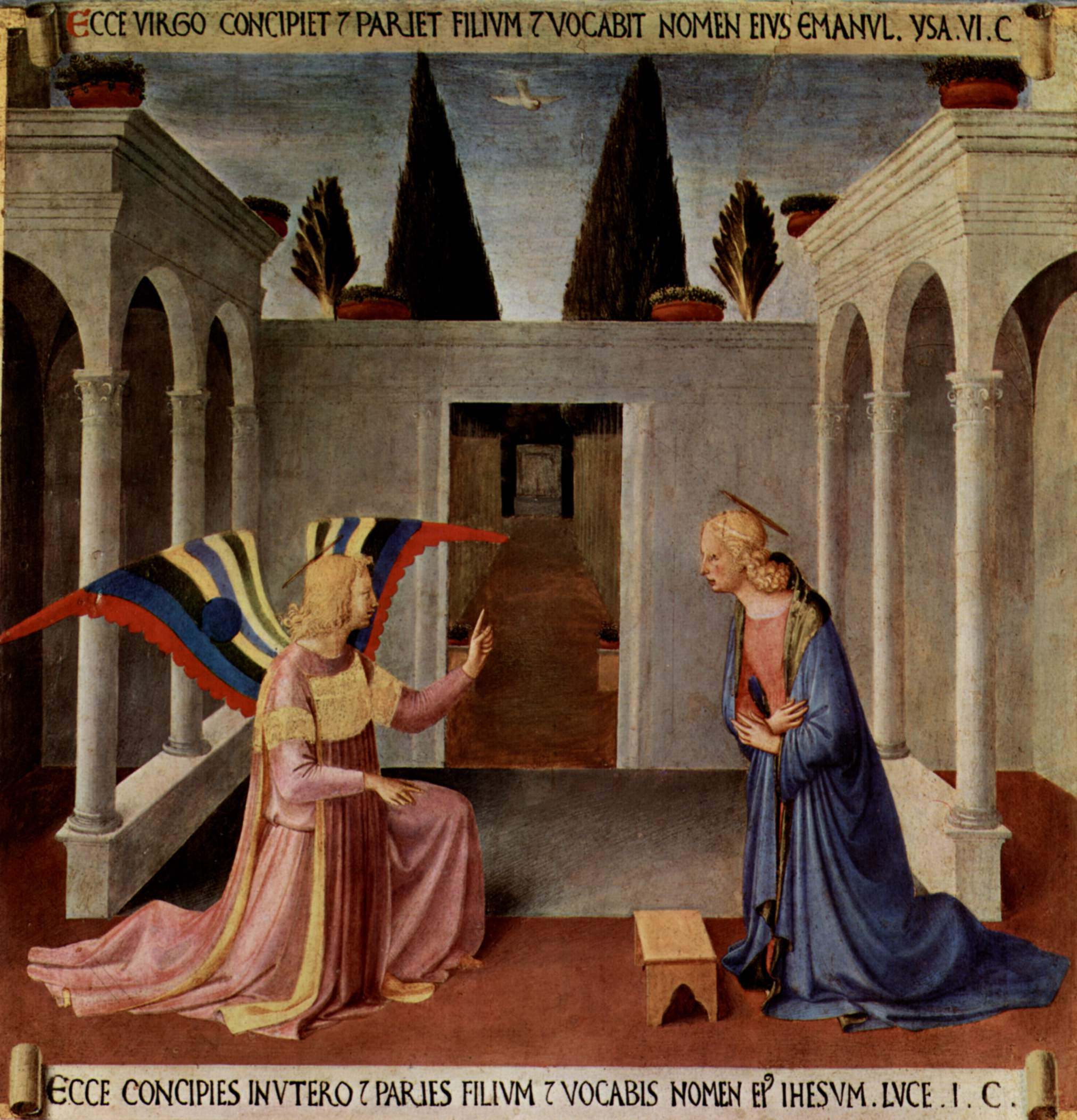 Bildzyklus zu Szenen aus dem Leben Christi für einen Schrank zur Aufbewahrung von Silbergeschirr, Szene: Verkündigung